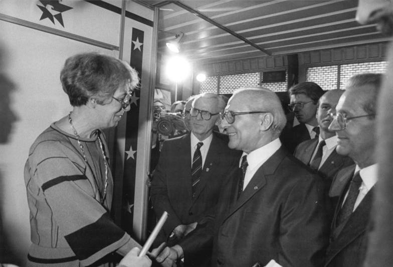 ADN-ZB Mittelstädt-10.3.85-hü-Leipzig- Frühjahrsmesse 85- In der Ausstellung der USA wurden Erich Honecker und weitere Mitglieder der Partei- und Staatsführung der DDR von der Botschafterin Rozanne L. Ridgway begrüßt. Rechts: Dr. Gerhard Beil.